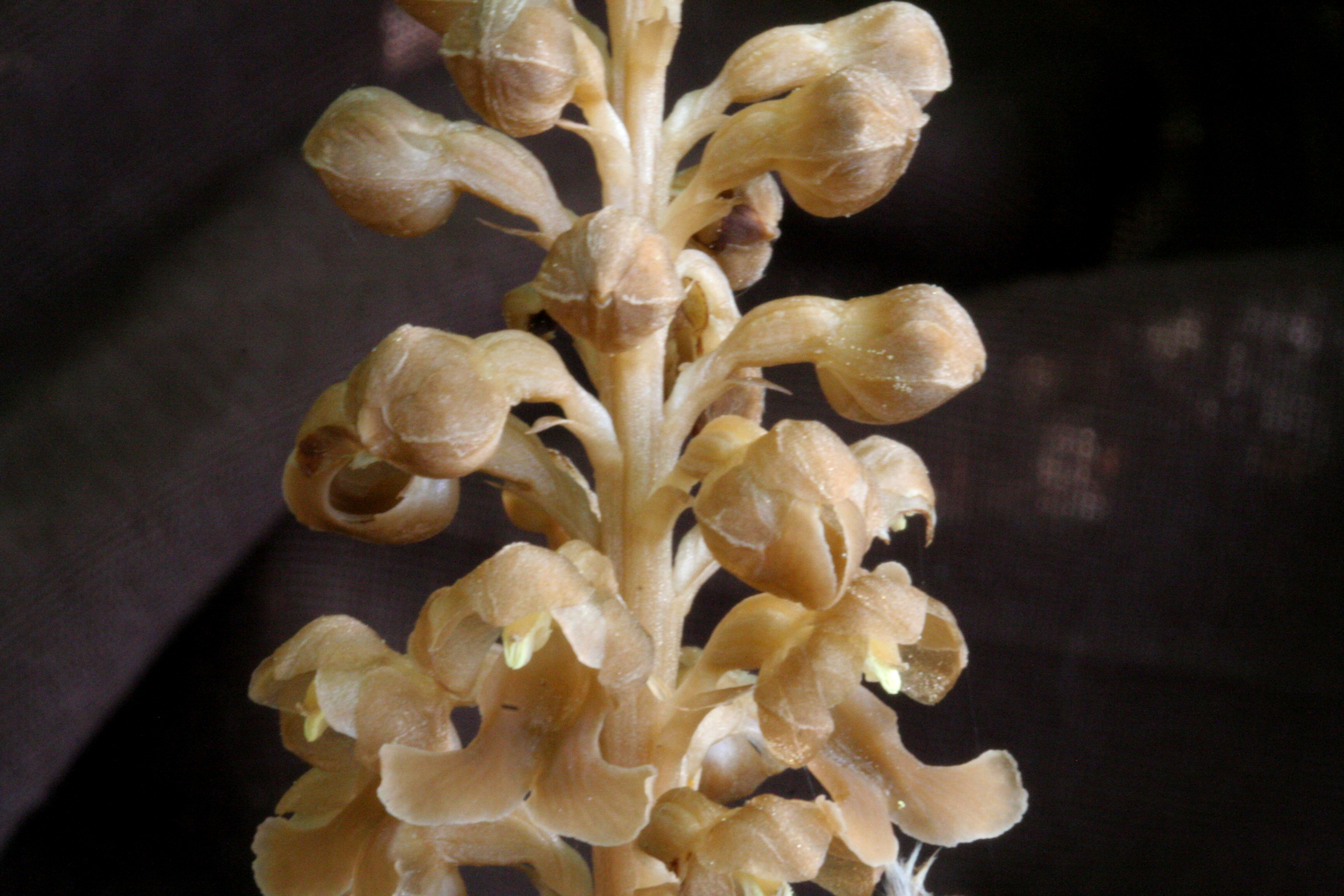 Neottia nido d'uccello - Località: Melere, Trichiana (BL), 843 m s.l.m.